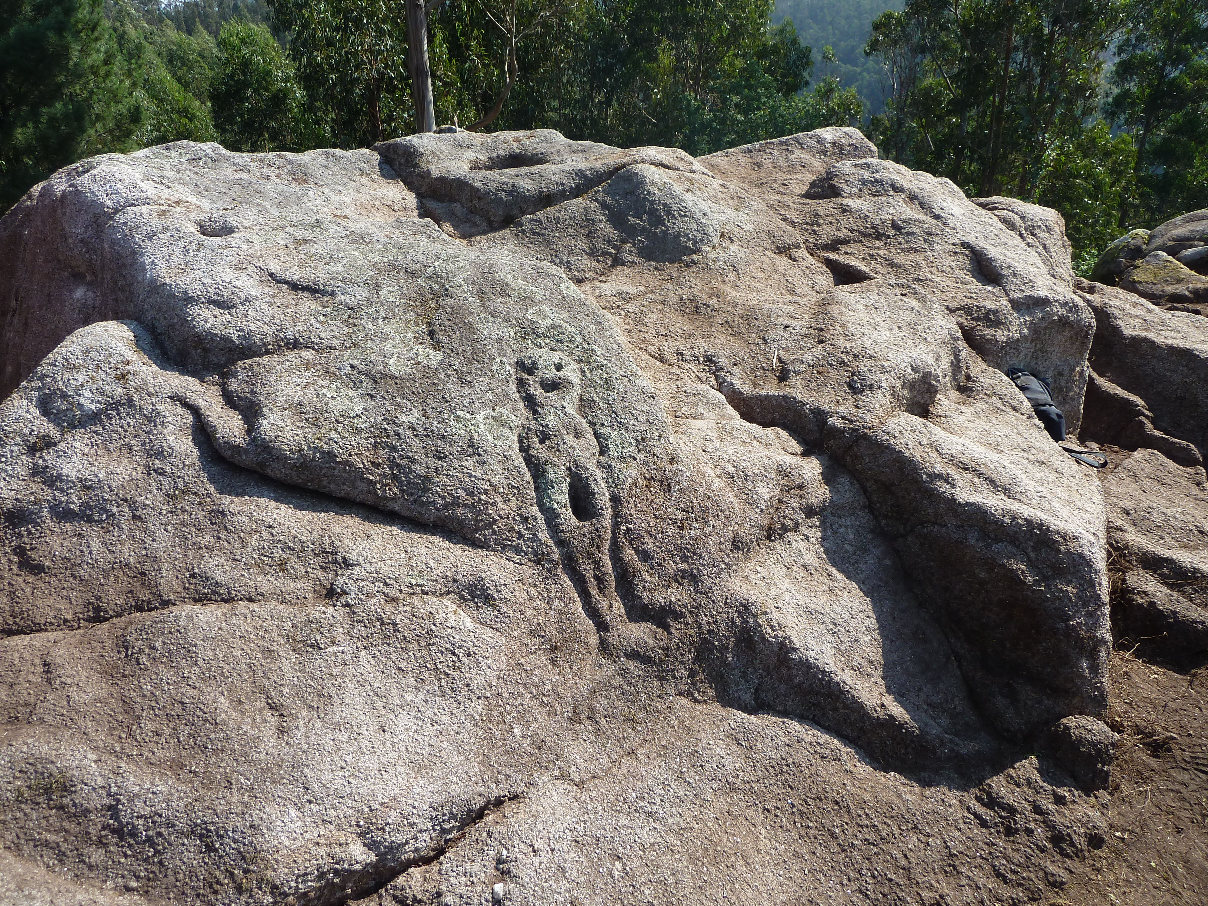 Moura Pena Furada (Coirós, Coruña)